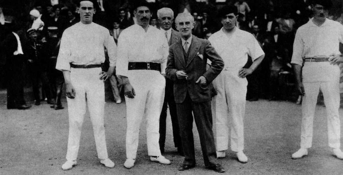 Maurice Ravel et les pelotaris à Ciboure le 24 août 1930, lors d'un festival organisé à l'occasion du baptême du Quai Maurice-Ravel.